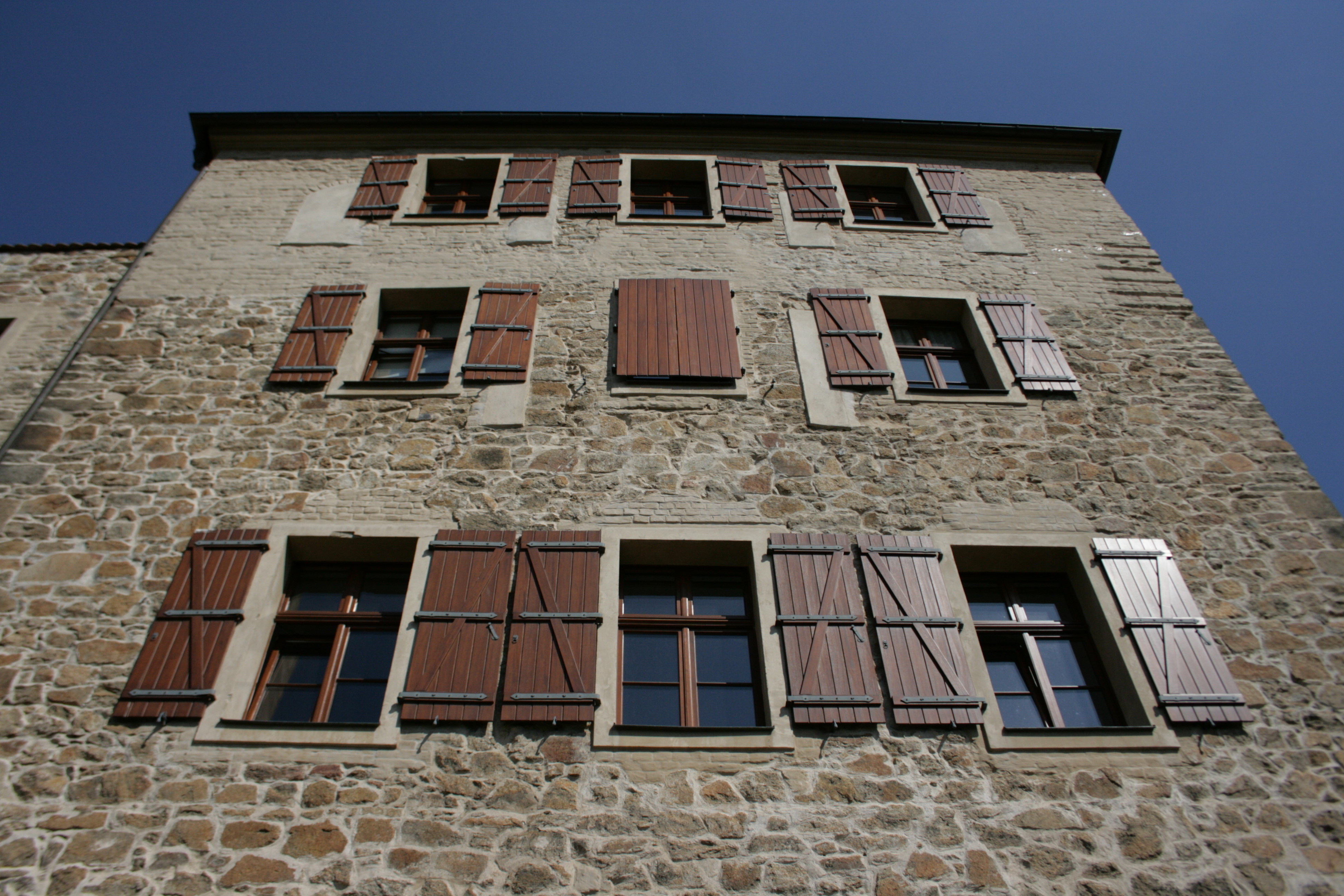 Mönchsbastei in der Mühltorgasse in Bautzen